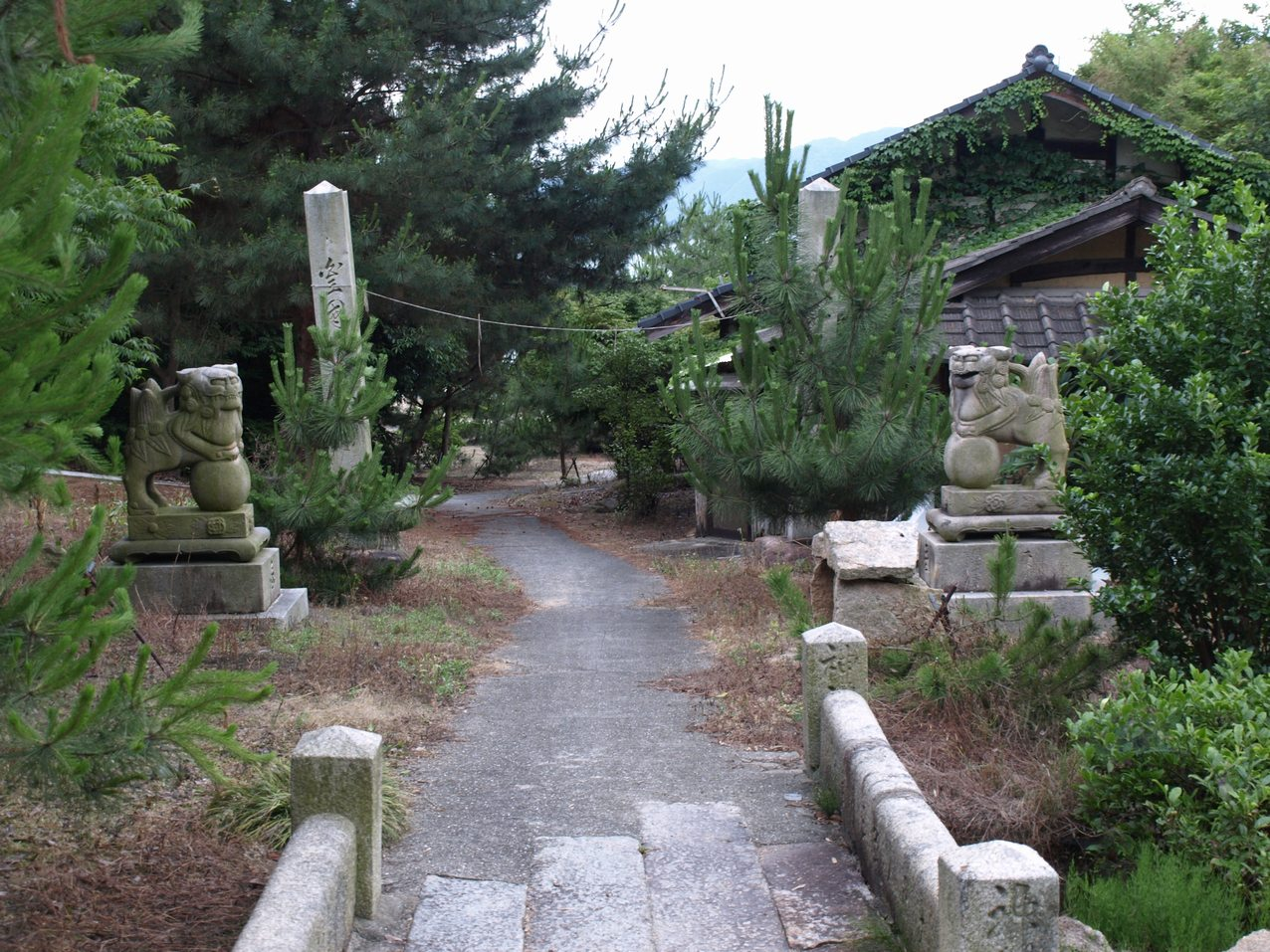 Iwashi Island